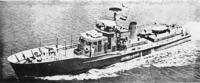 ספינת משמר מצרית תוצרת מספנות דה קסטרו במפרץ סואץ, 1973